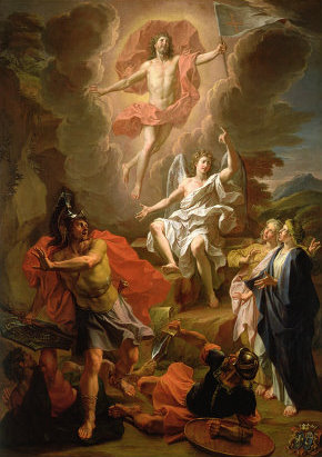 Ressurreição de Cristo por Noël Coypel.